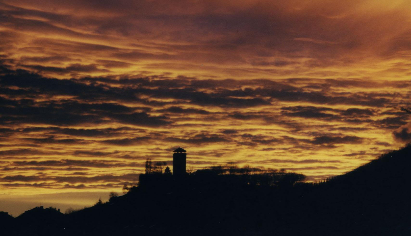 Bild der Burg Beilstein in der Abendsonne